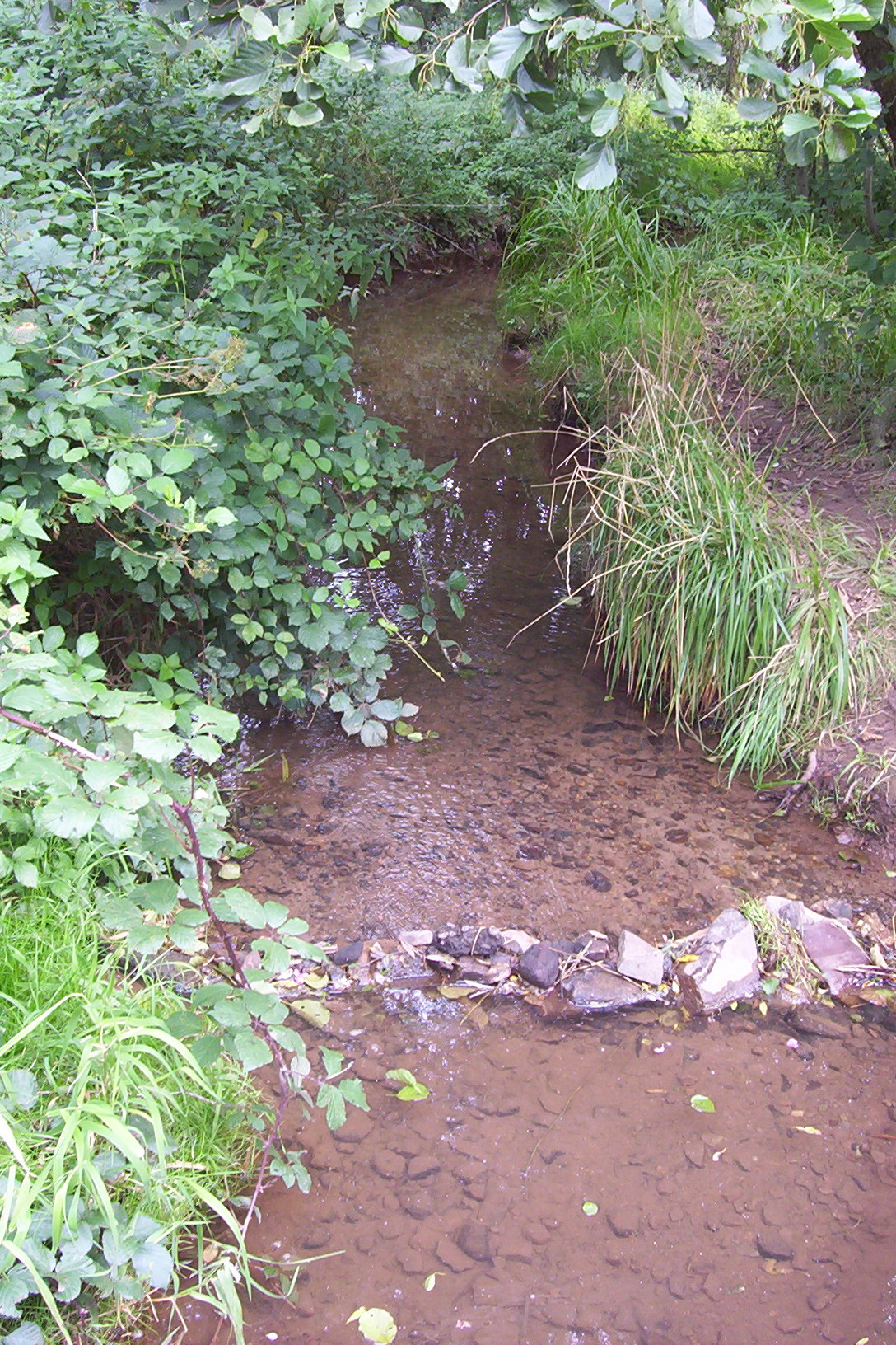 Die Merch (Bachlauf) bei Goettelborn